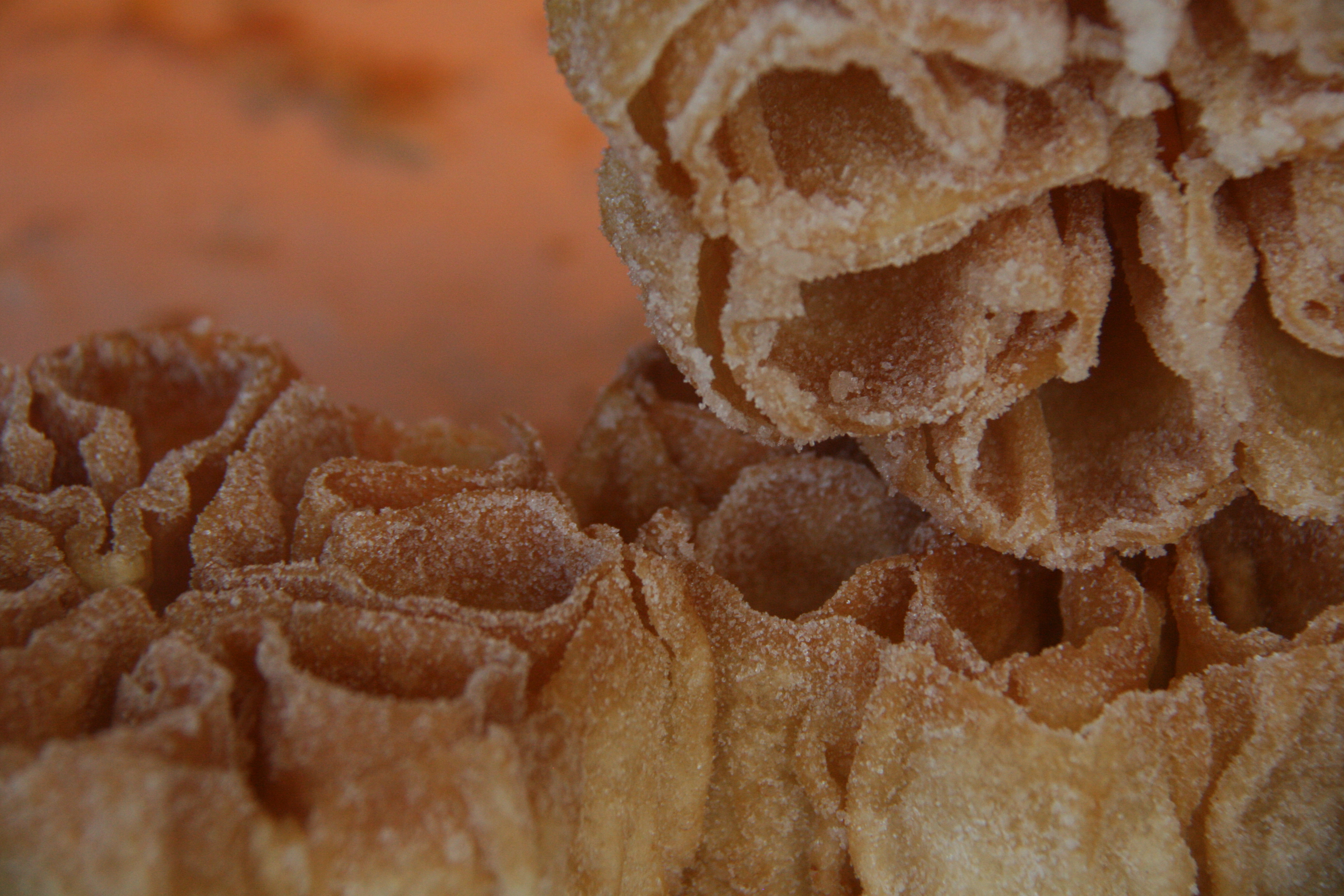 Flores fritas